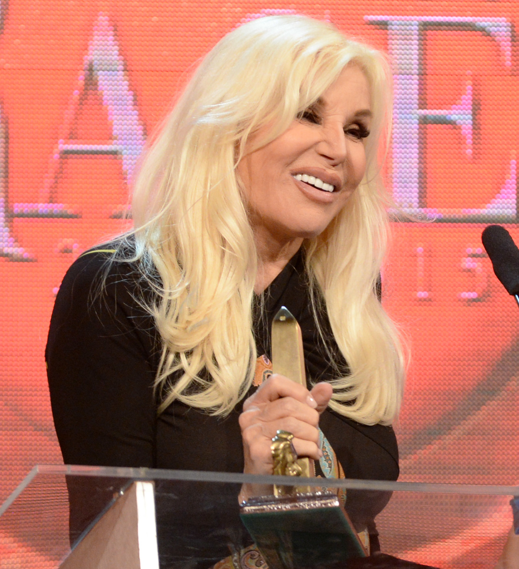 Susana Gimenez y Paola Krum durante la entrega de los Premios ACE en 2015